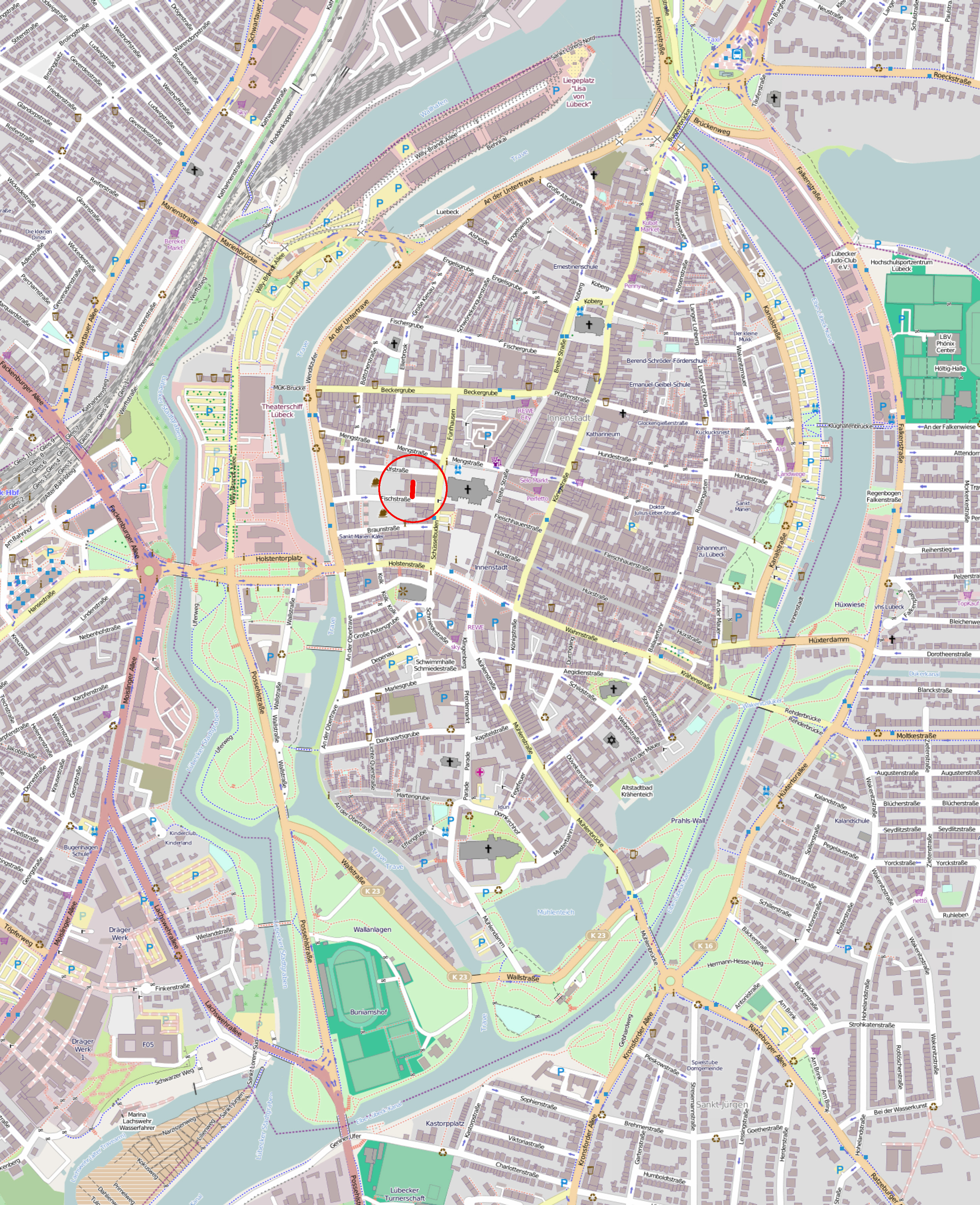 Der Verlauf der Neuen Quertraße in Lübeck, rot markiert auf einer OpenStreetMap-Karte